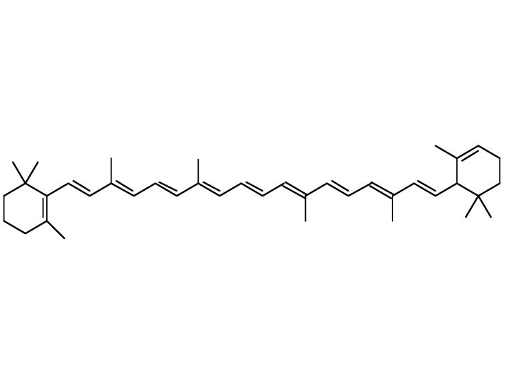 Struttura del α-carotene.